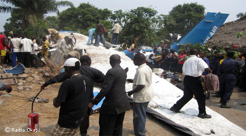 Crash avion Fil Air Photos du crash d'un avion de Fil Air à Bandundu